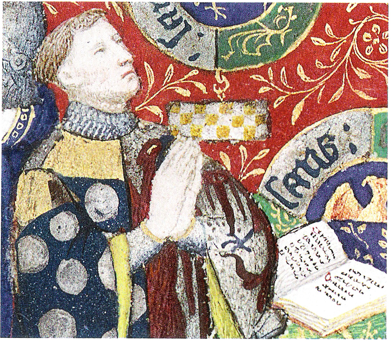 Livre d'heures de Jean de Boucicaut, f.26v (détail), vers 1405-1408.